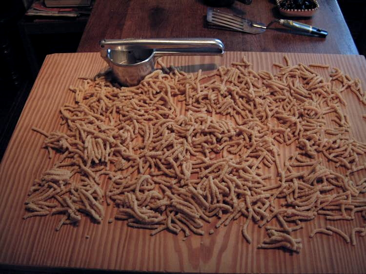 Je suis l'auteur de cette photo (les "passatelli" représentée sur la photo ont été réalisés par mon épouse).